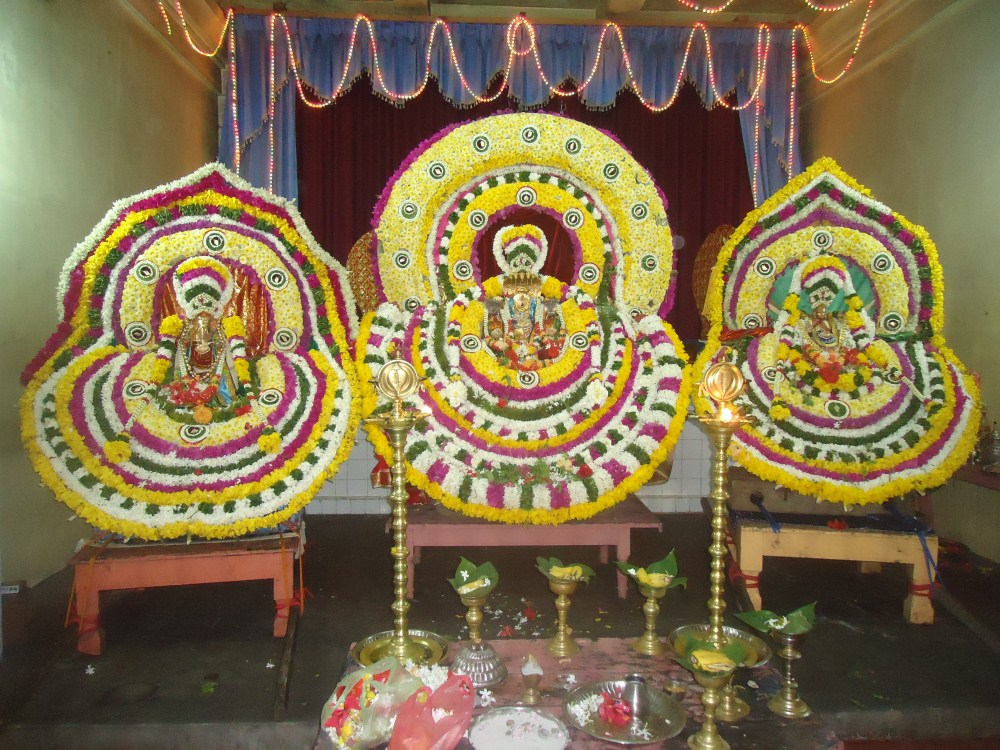 வல்லிபுர ஆழ்வார் உற்சவ மூர்த்தி